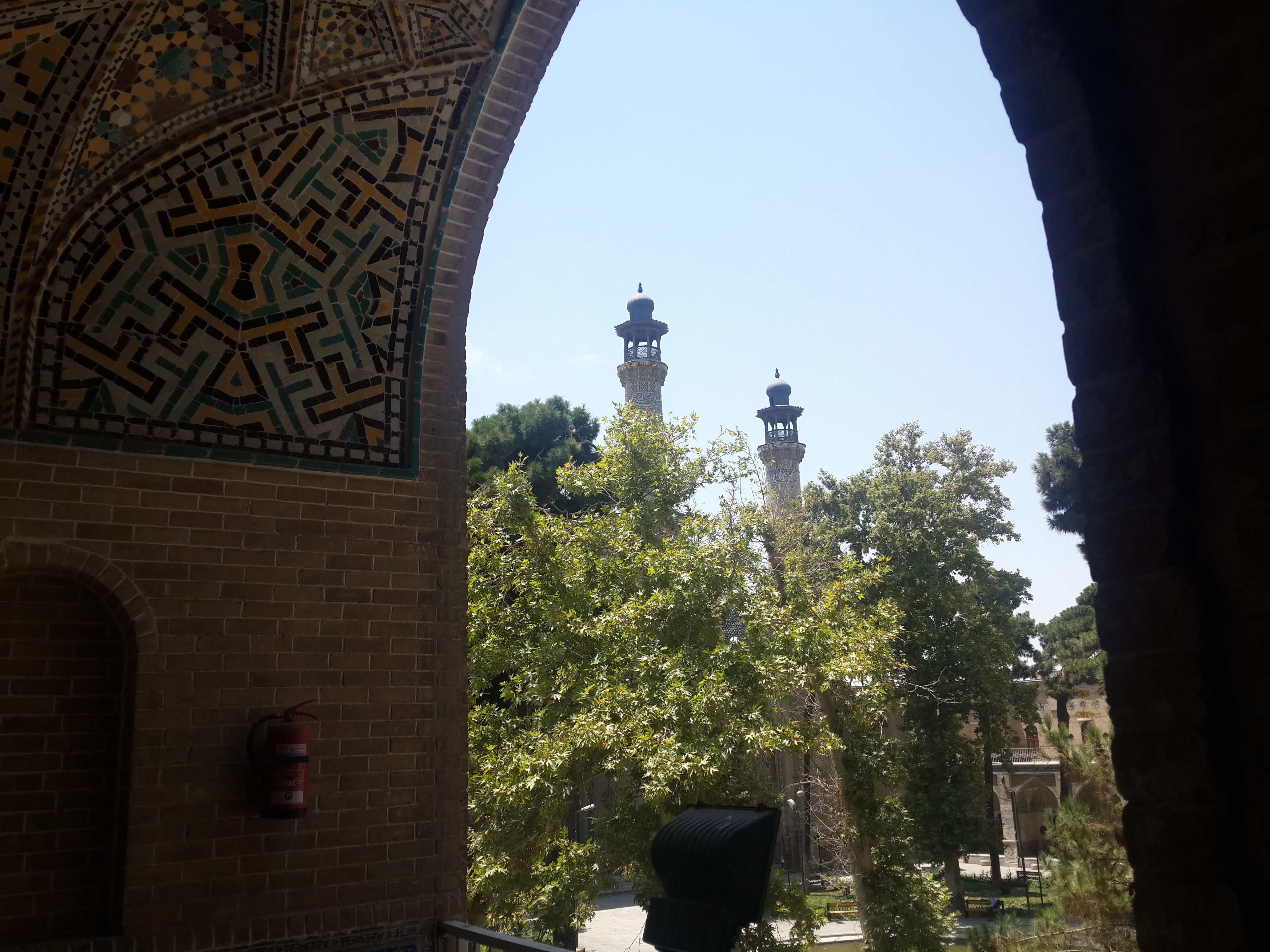 مسجد سپهسالار/ مدرسه عالی شهید مطهری